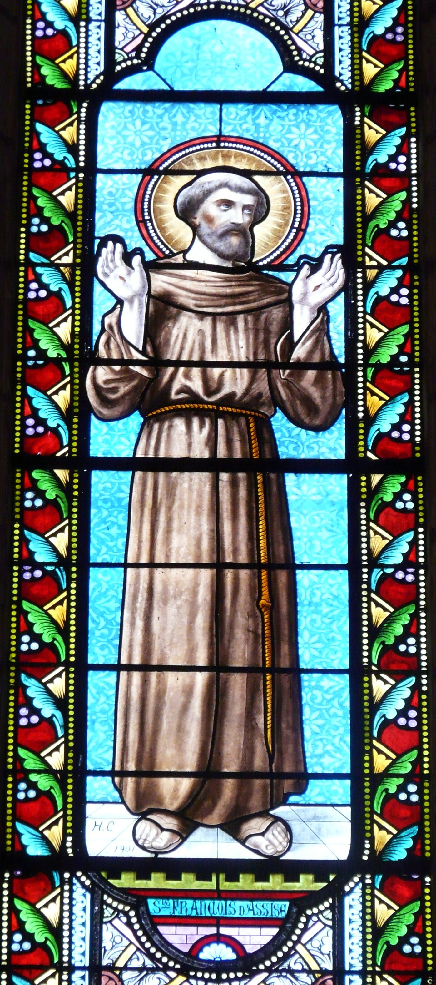 Saint François d'Assise, détail d'un vitrail de la nef de l'église Saint-Pierre-ès-Liens, Lalinde, Dordogne, France.